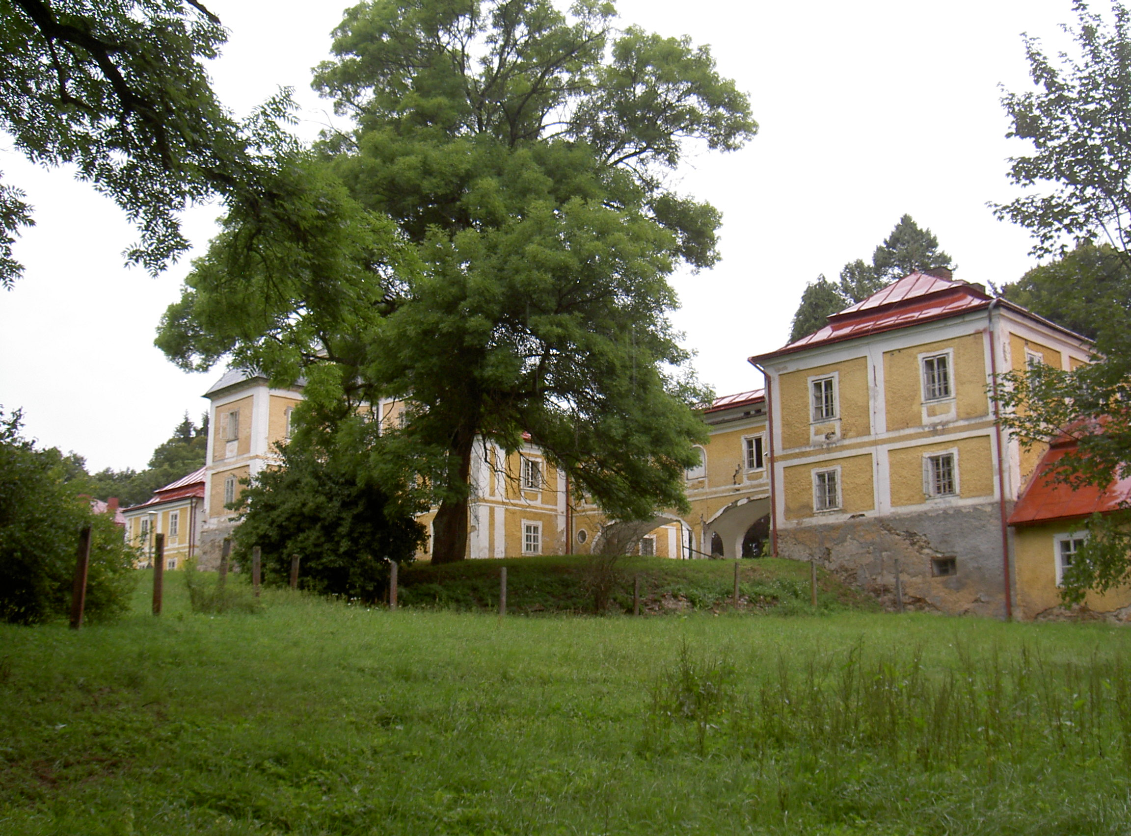 Jagdschloss Diana, Gemeinde Rozvadov